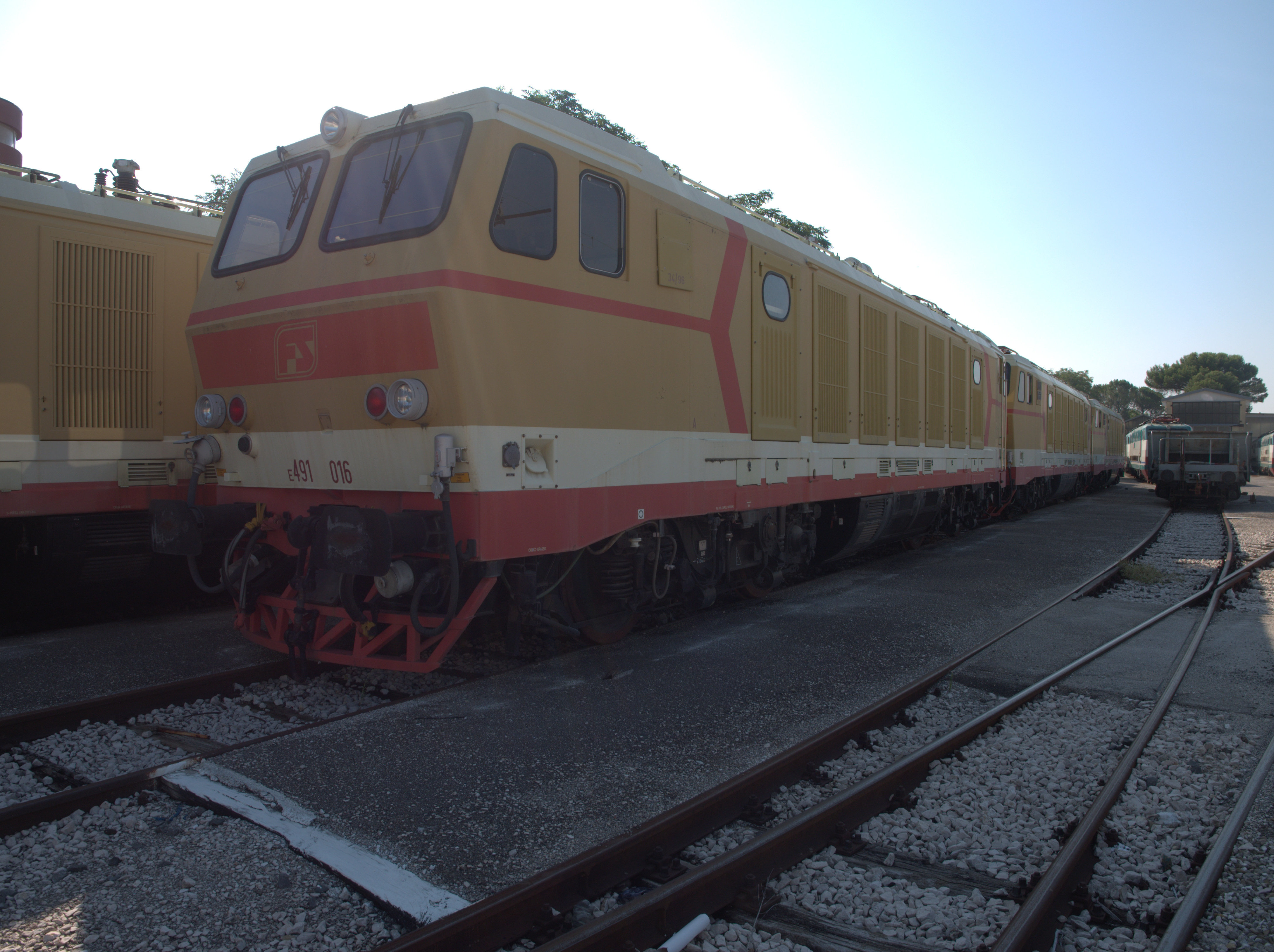 Foligno